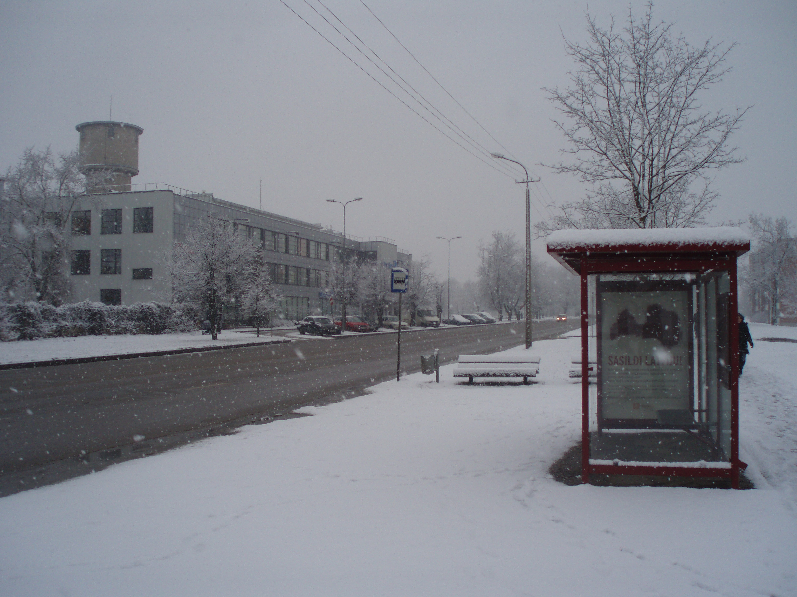 Bijusī pietura PKK (tagad Rūpnīcas iela) un bijušā Rēzeknes piena konservu kombināta galvenā ēka Atbrīvošanas alejā.